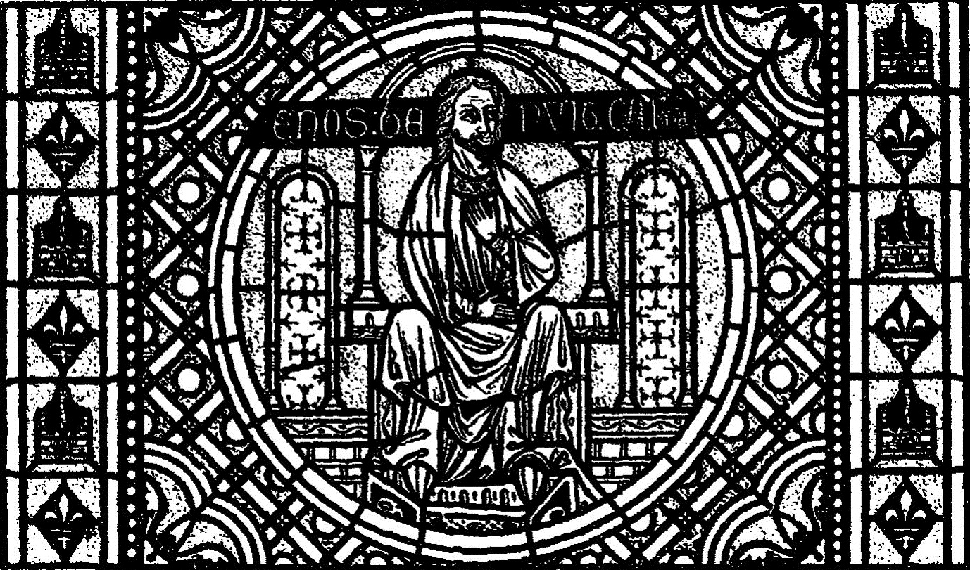 Le patriarche Énos (Énosh), médaillon des verrières de la chapelle Notre-Dame-du-Haut-Don, située dans la Primatiale Saint-Jean de Lyon ; illustre les « vitraux du Moyen âge et de la Renaissance dans la région lyonnaise », de Lucien Bégule.